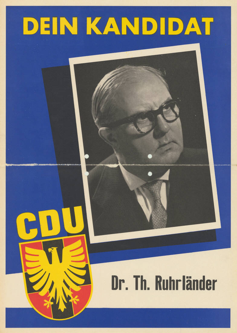 Dein Kandidat CDU Dr. Th. Ruhrländer Abbildung: Porträtfoto - CDU-Logo Plakatart: Kandidaten-/Personenplakat mit Porträt Objekt-Signatur: 10-009 : 444 Bestand: Landtagswahlplakate Nordrhein-Westfalen (10-009) GliederungBestand10-18: Landtagswahlplakate Nordrhein-Westfalen (10-009) » Landtagswahl am 6.7.1958 » CDU » mit Porträt-Foto Lizenz: KAS/ACDP 10-009 : 444 CC-BY-SA 3.0 DE